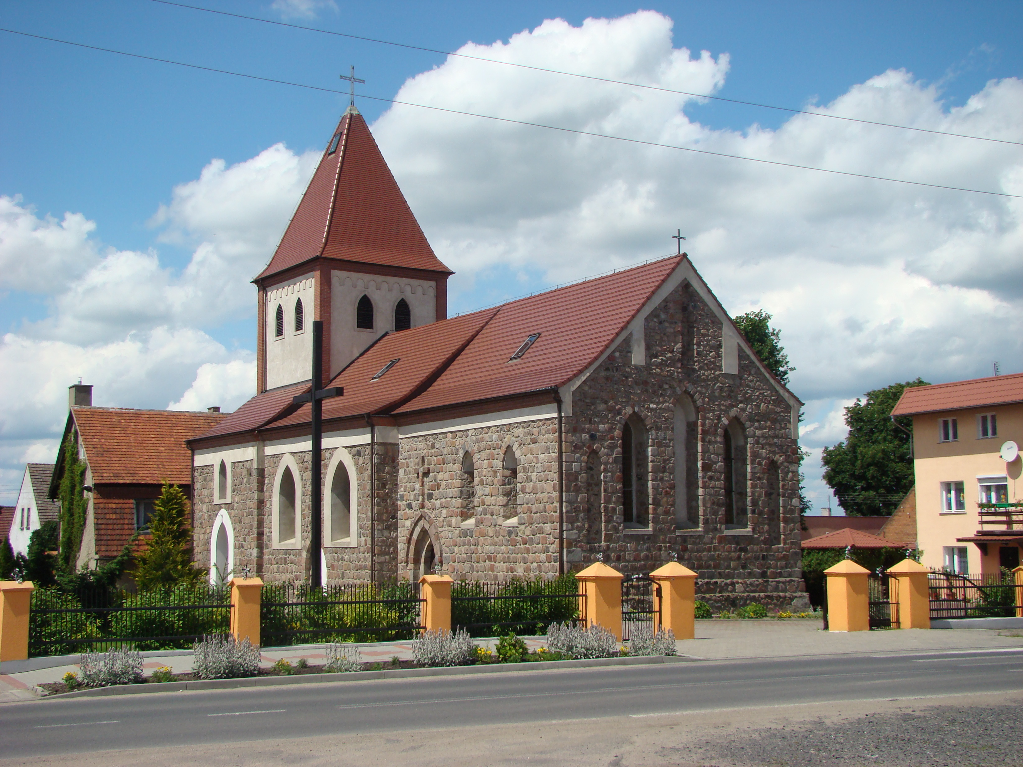 Kirche in Kowalów (Kohlow)